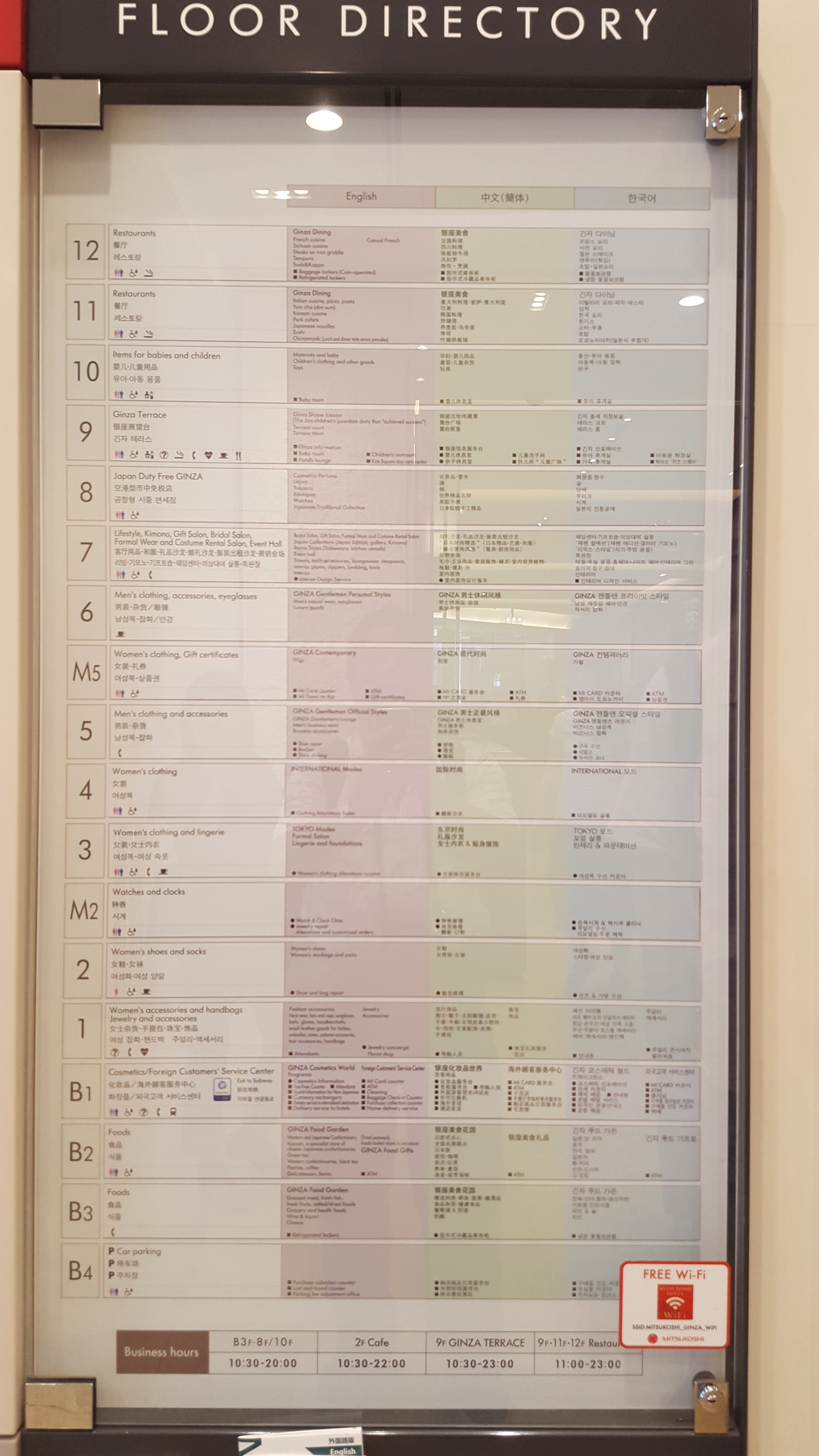 FLOOR DIRECTORY